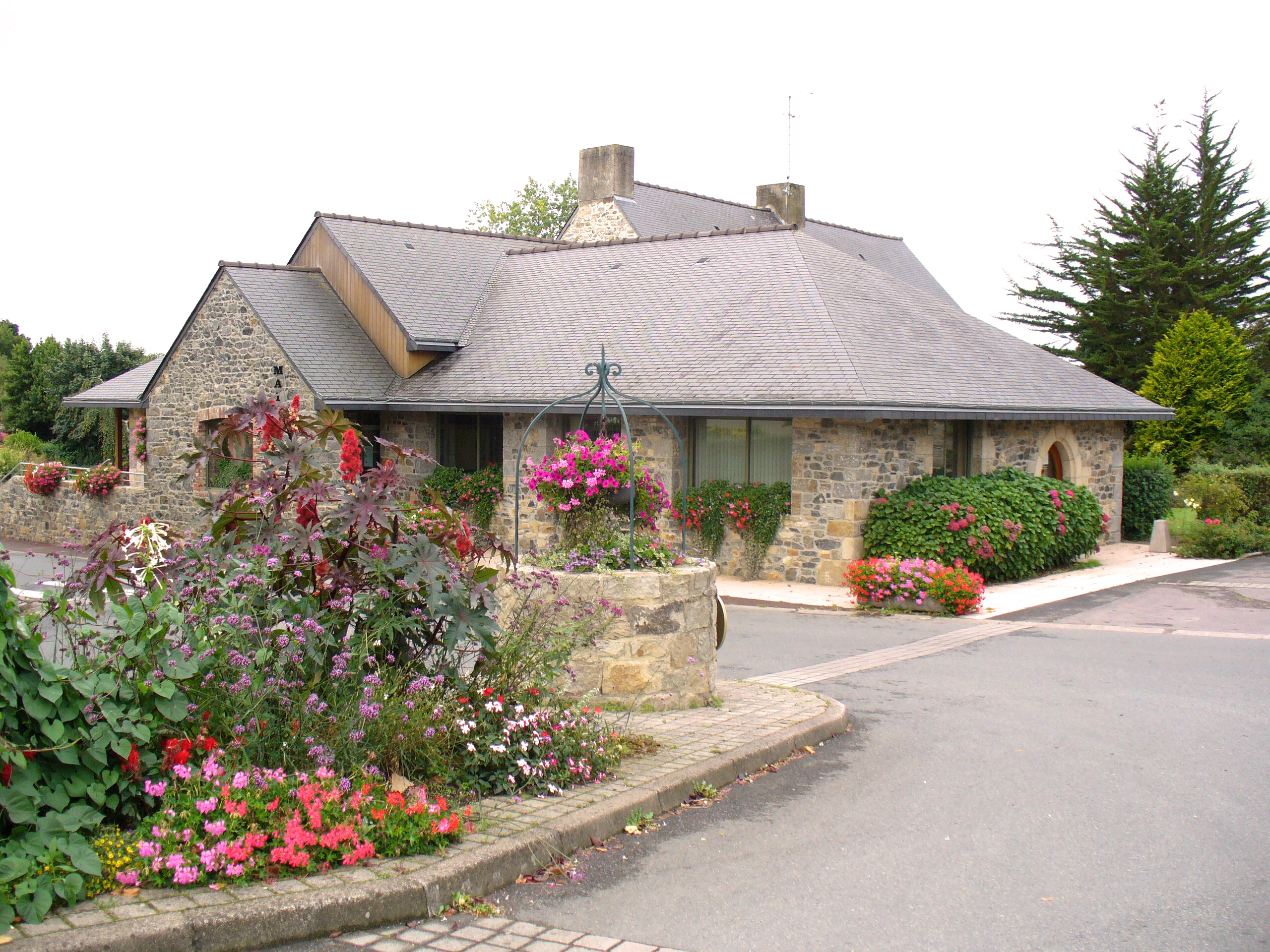 Mairie de Morieux